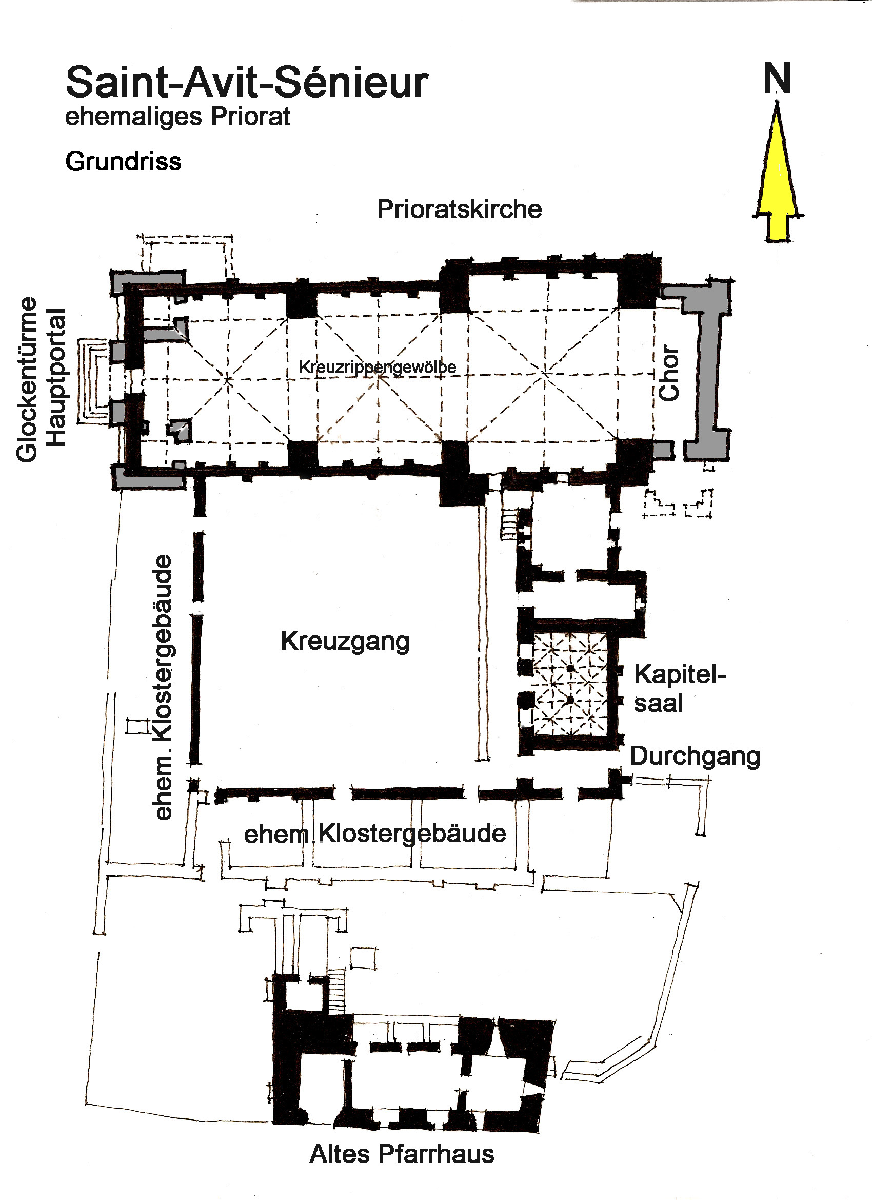 Priorat St.-Avit-Sénieur Grundriss Handskizze